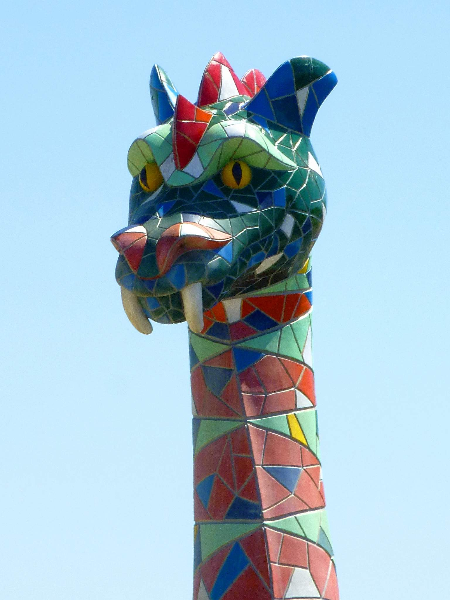 Leganés - Barrio de Leganés Norte 1, escultura-rotonda 'Nensi, el Monstruo de Leganés', de dEmo, 2009